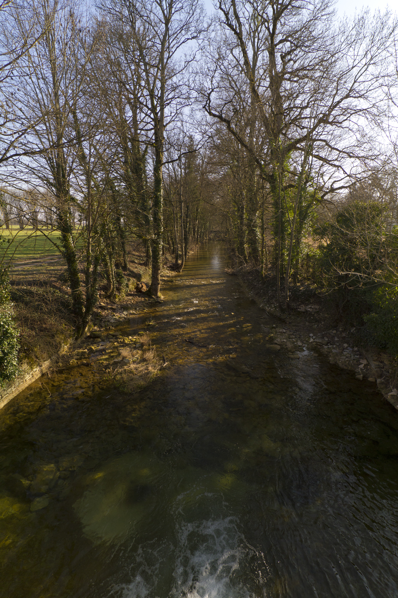 Le cours du Suzon au niveau de Vantoux. Depuis le pont de la d 104h. Vue en direction du Sud (vers Dijon)